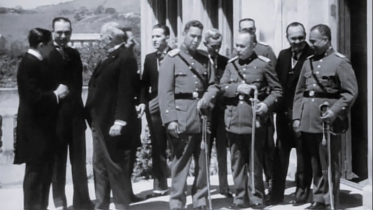 El General Martinez Con Su Gabinete Presidencial